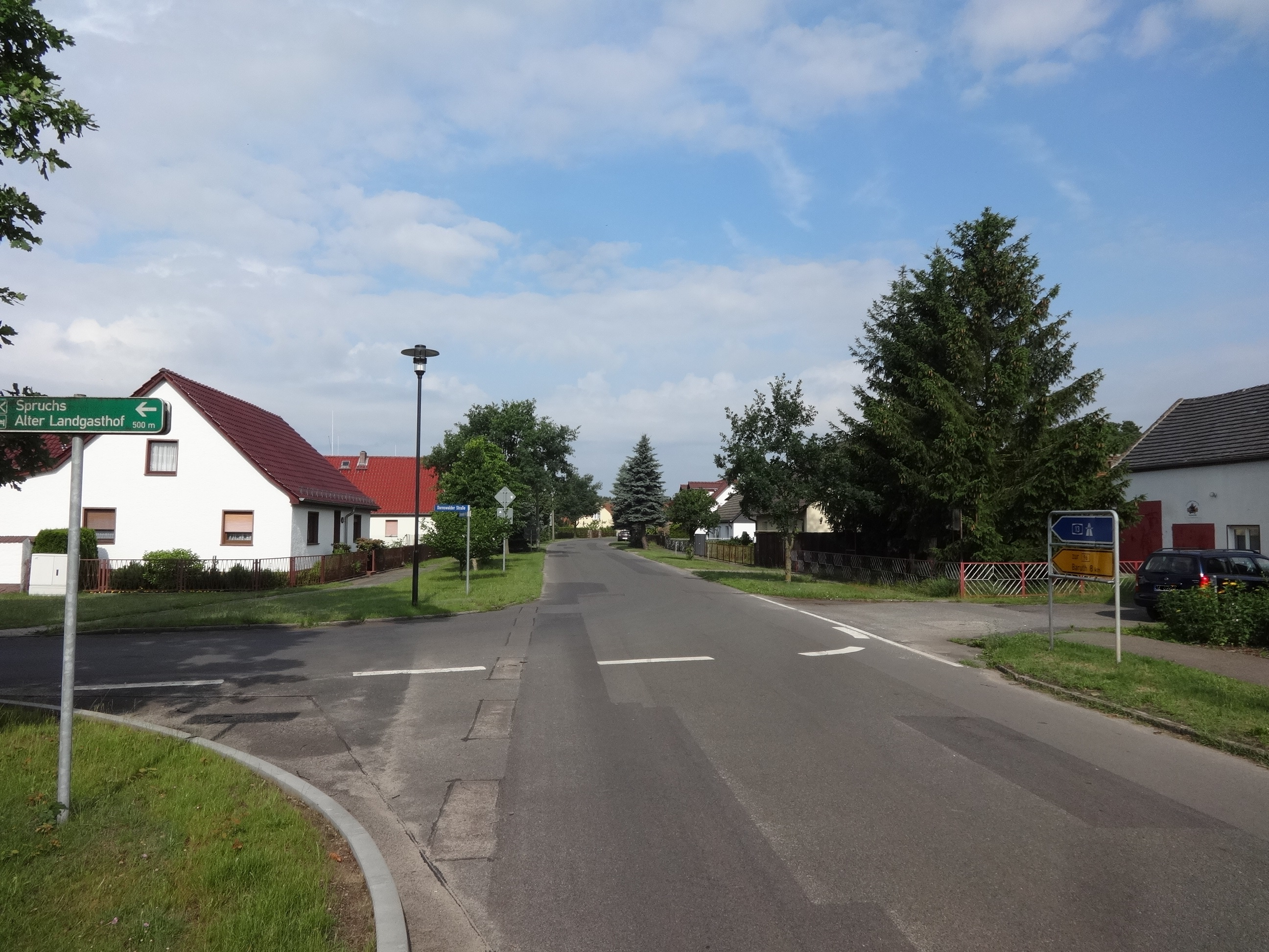 Blick auf die Dornswalder Straße in Dornswalde, ein Ortsteil von Baruth/Mark in Brandenburg